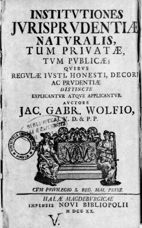 Frontespizio